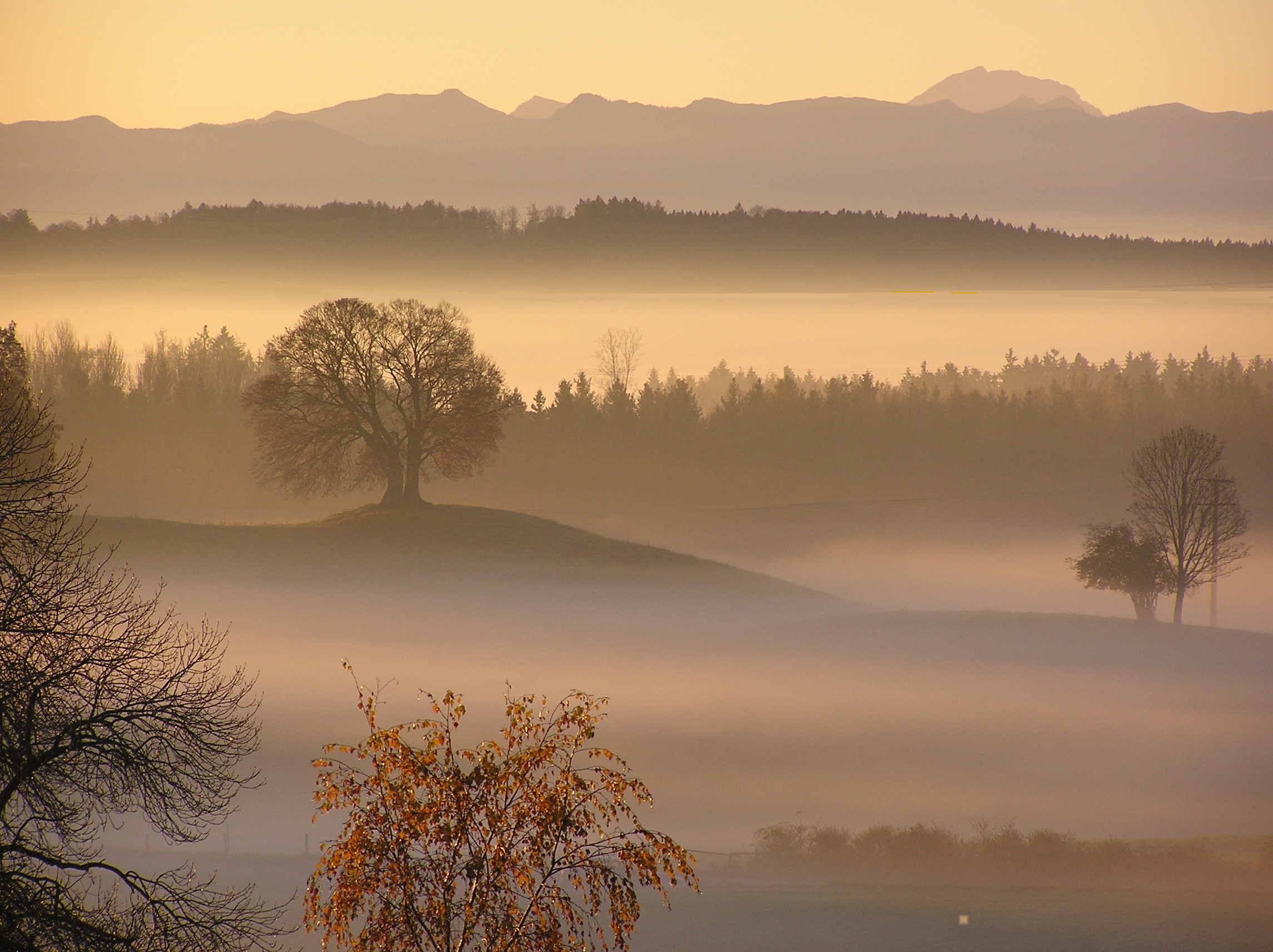 Die Drumlin-Buche im Landschaftsschutzgebiet „Westlicher Teil des Landkreises Starnberg“ (LSG-00542.01). Blick bei Sonnenuntergang über Höhenrücken im Ammer-Loisach-Hügelland zu Bergen des Mangfallgebirges. Im Hintergrund rechts oben ist der südlich des Mangfallgebirges in den österreichischen Brandenberger Alpen liegende Guffert (2.194 m ü. A.) zu sehen.